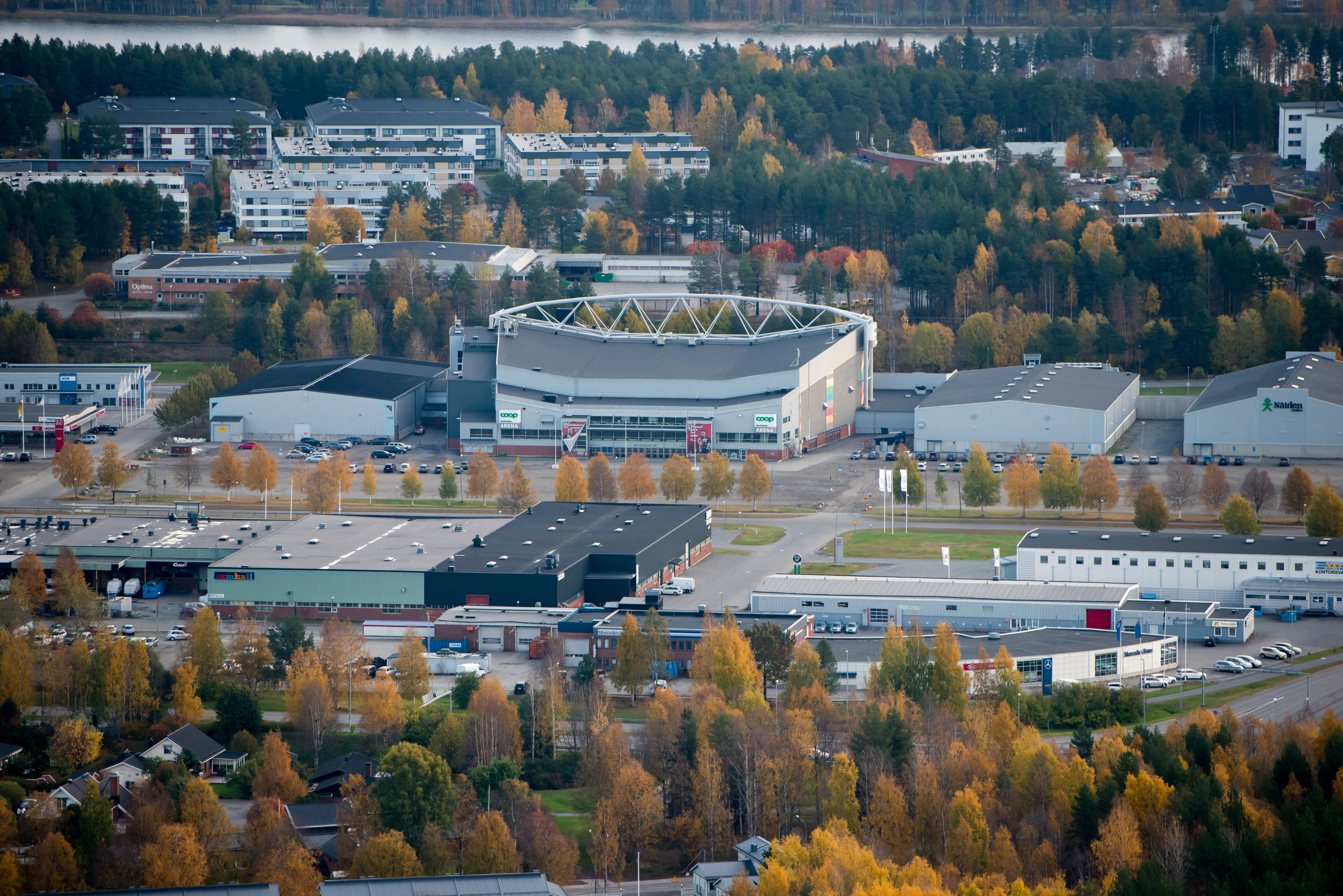 Ishall där Luleå Hockey spelar sina matcher.